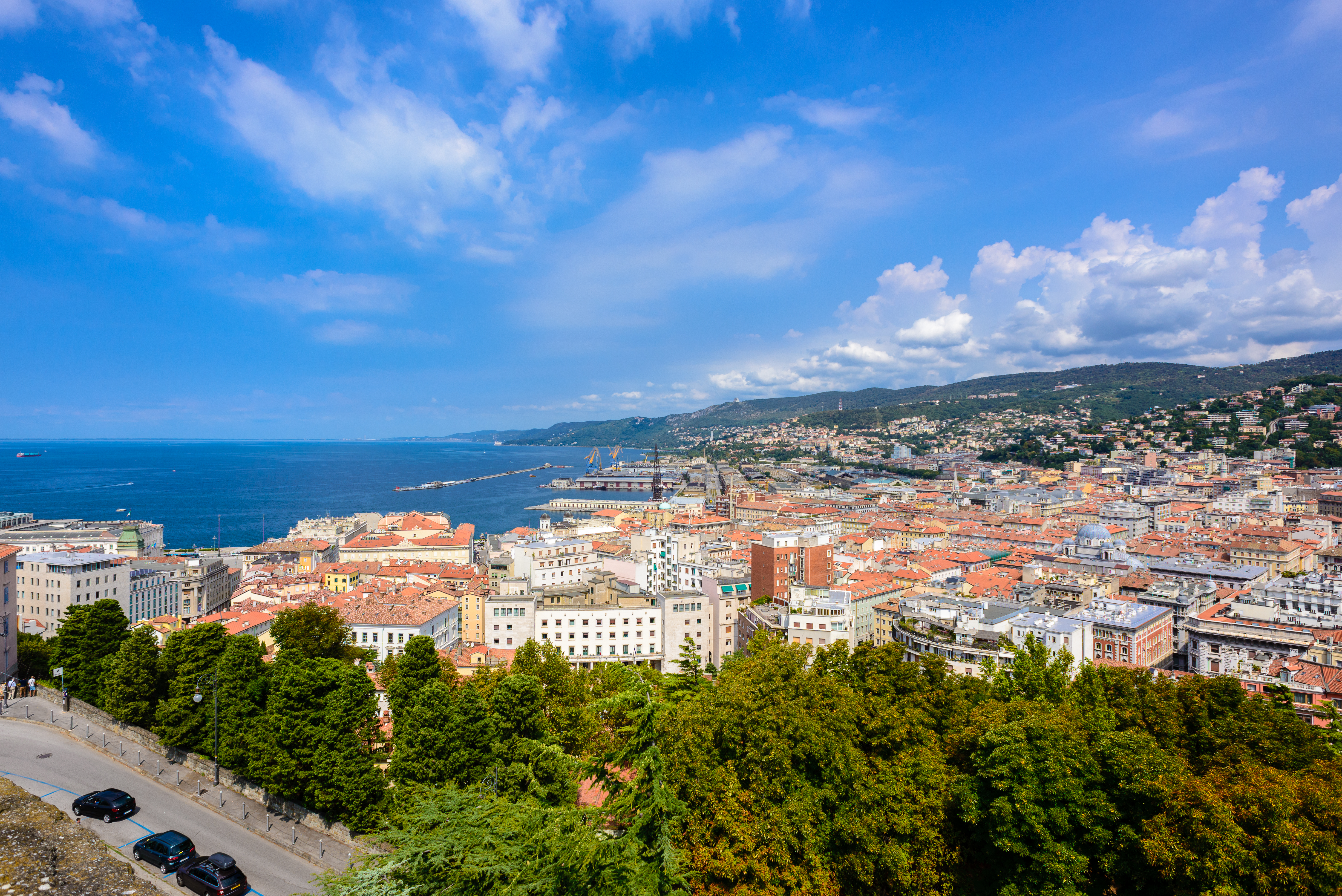 Trieste